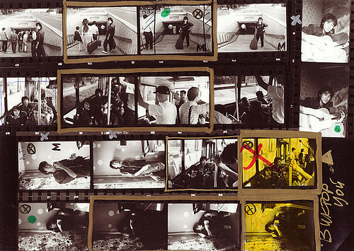 Контактные отпечатки съёмки Виктора Цоя